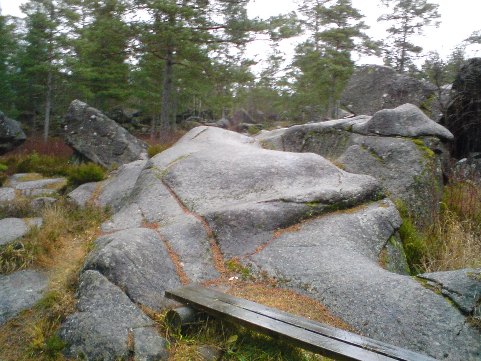 Sveafallen vid Degerfors i Örebro län. Enligt länsstyrelsen i Örebro län [1] var detta platsen för den väldiga issjön Ancylussjöns utlopp i det dåtida Västerhavet. Ancylussjön omfattade stora delar av nuvarande Östersjön.